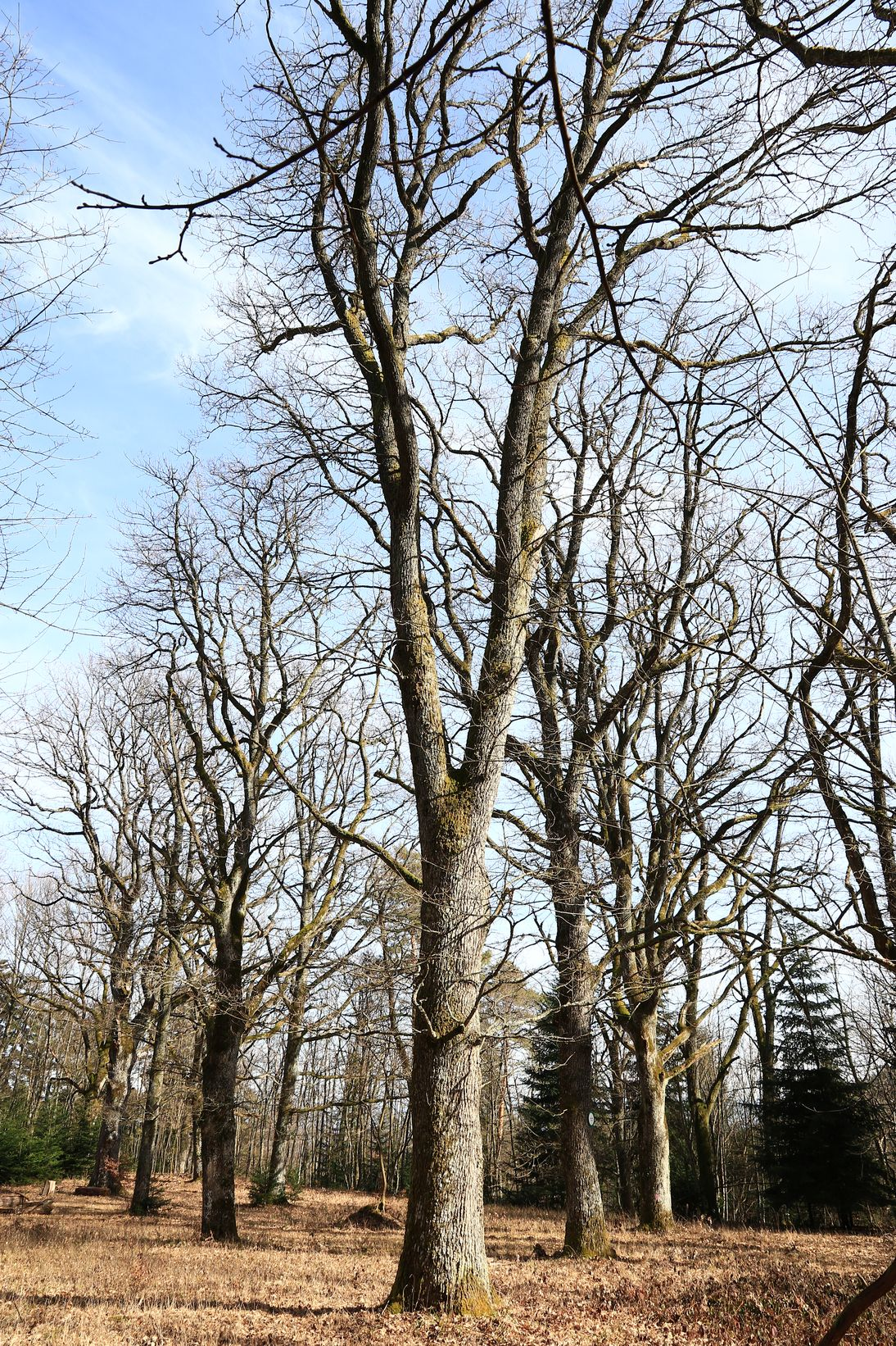 La clairière avait la forme d'un losange.